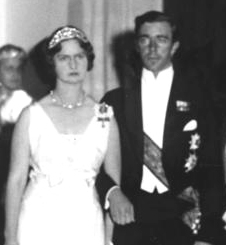 Erbprinz Gustaf Adolf von Schwedin bei der Hochzeit mit seiner Gattin Prinzessin Sibylla von Sachsen-Coburg und Gotha (1932). Factual corrections and alternative descriptions are encouraged separately from the original description. Additionally errors can be reported at this page to inform the Bundesarchiv. Original historic description: Coburger Fürstenhochzeit Die Koburger Fürstenhochzeit. Vortext siehe Bild Nr.25477 U.B.z. das junge Paar mit den Eltern bei den Polterabend-Festlichkeiten, von links nach rechts: Herzog von Koburg, Kronprinz von Schweden, Erbprinz Gustaf Adolf und seine junge Gattin, Prinzessin Sibylle, Kronprinzessin von Schweden und Herzogin von Koburg. Abgebildete Personen: * Sachsen-Coburg und Gotha, Karl-Eduard von: 1884-1954, Herzog, Präsident des Deutschen Roten Kreuzes, Deutschland